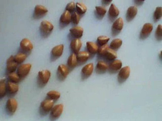 kasha grains